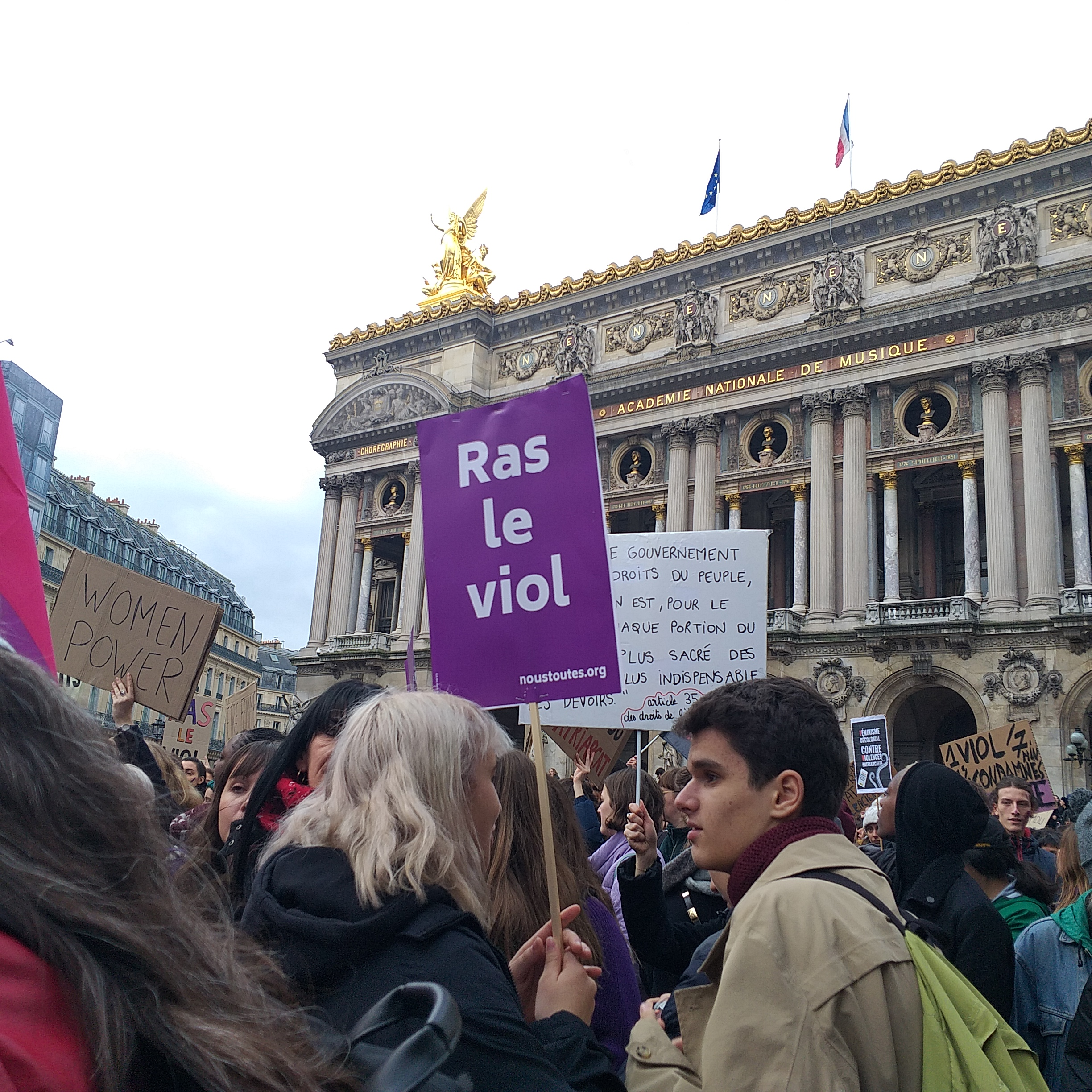 Marche 23 nov 2019 - départ place de l'opéra "ras le viol"